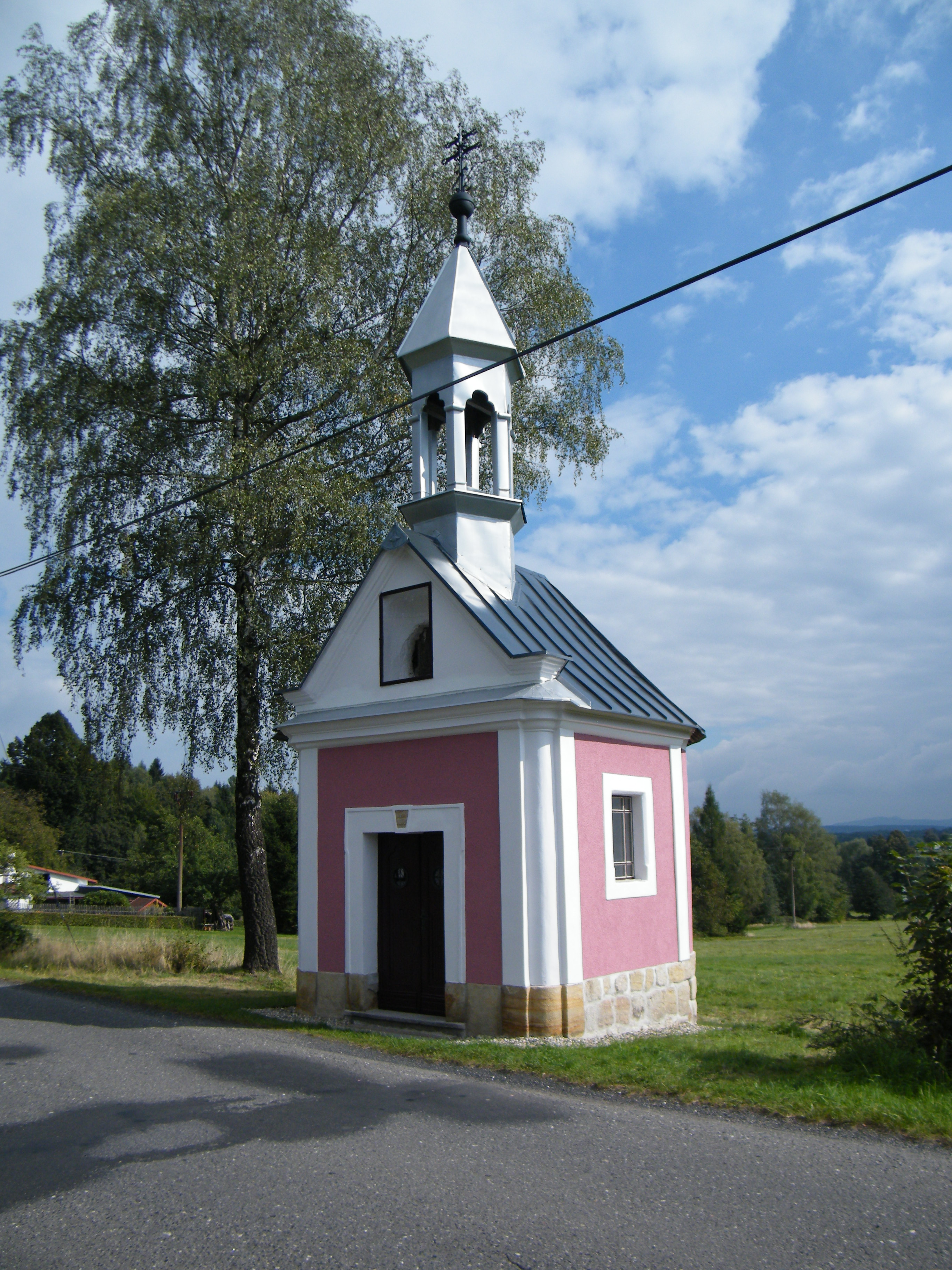 Kaple Panny Marie Pomocné v Zahradách u Krásné Lípy